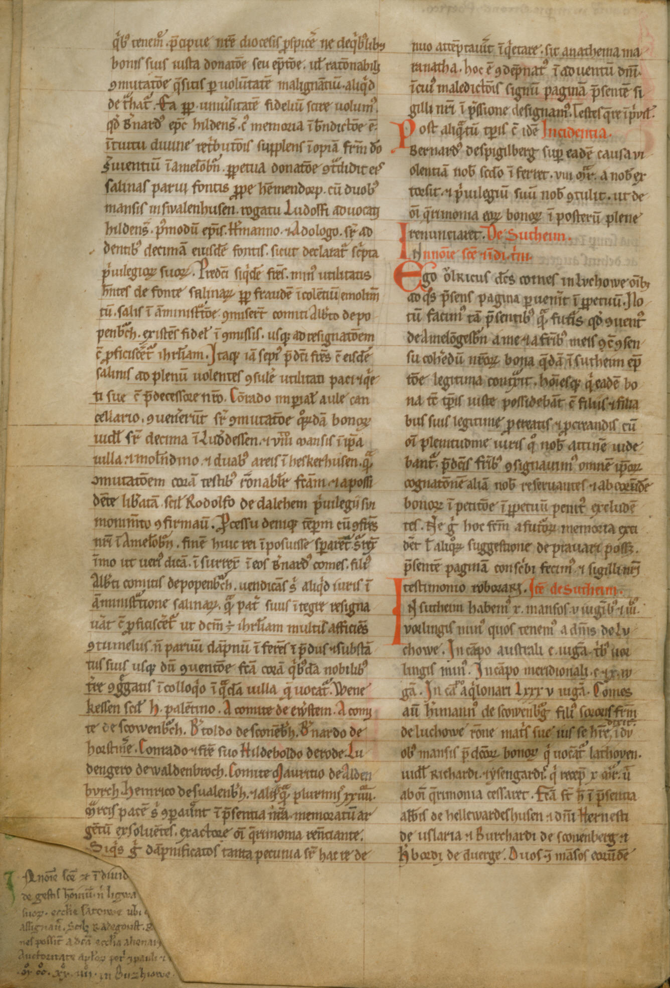 Fotokopie der ältesten Urkunde des Ortes Wennigsen (Deister); Kopialbuch des Kloster Amelungsborn